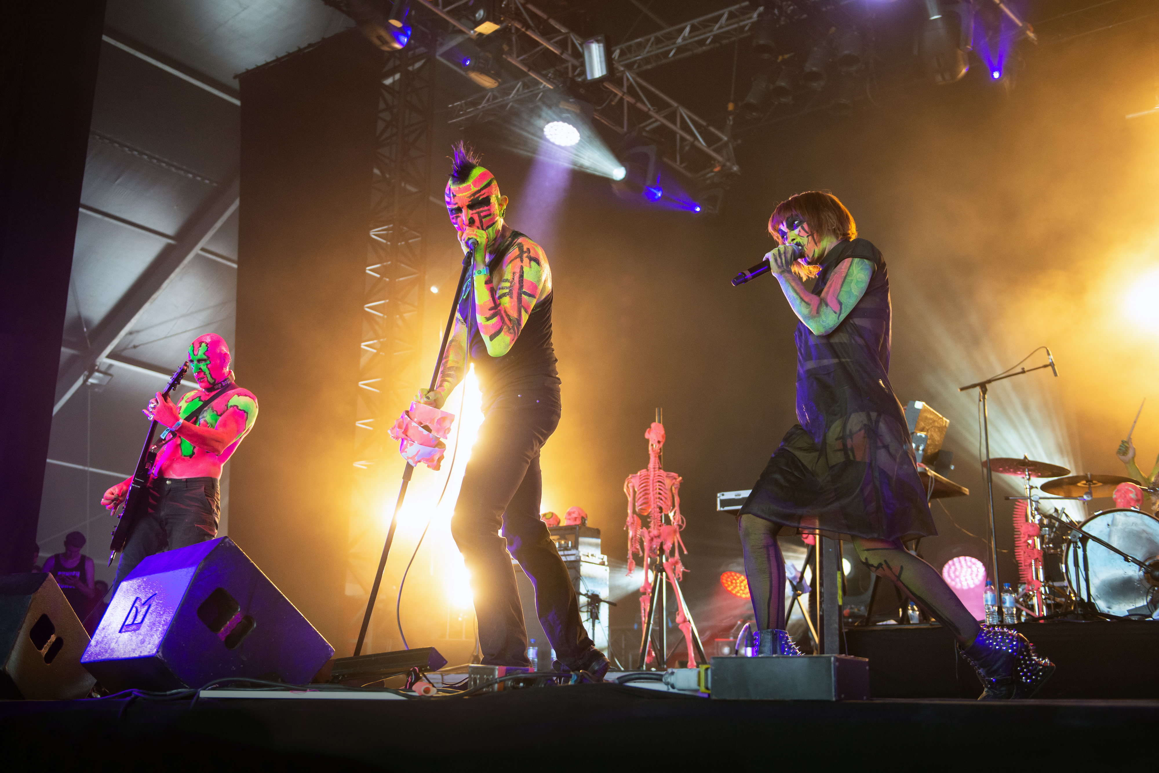 Concert du groupe français Punish Yourself au Hellfest 2019.